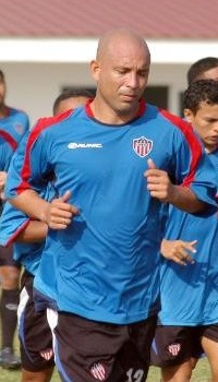 Ricardo Ciciliano en su primer entrenamiento con Atlético Junior de Barranquilla 2009